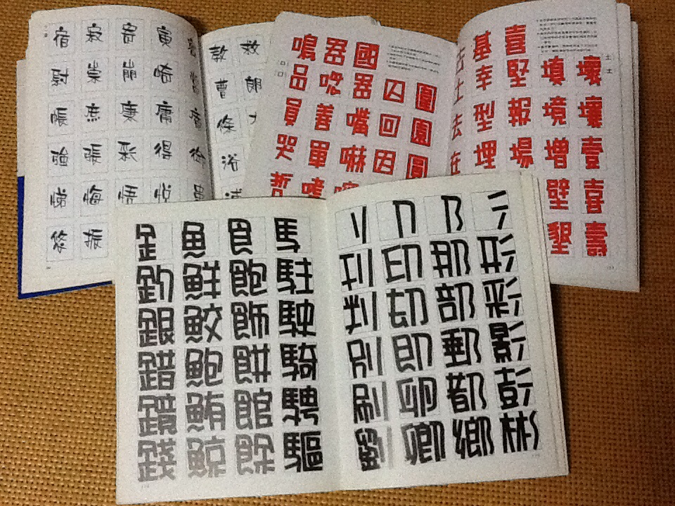 各種手繪POP字體參考書